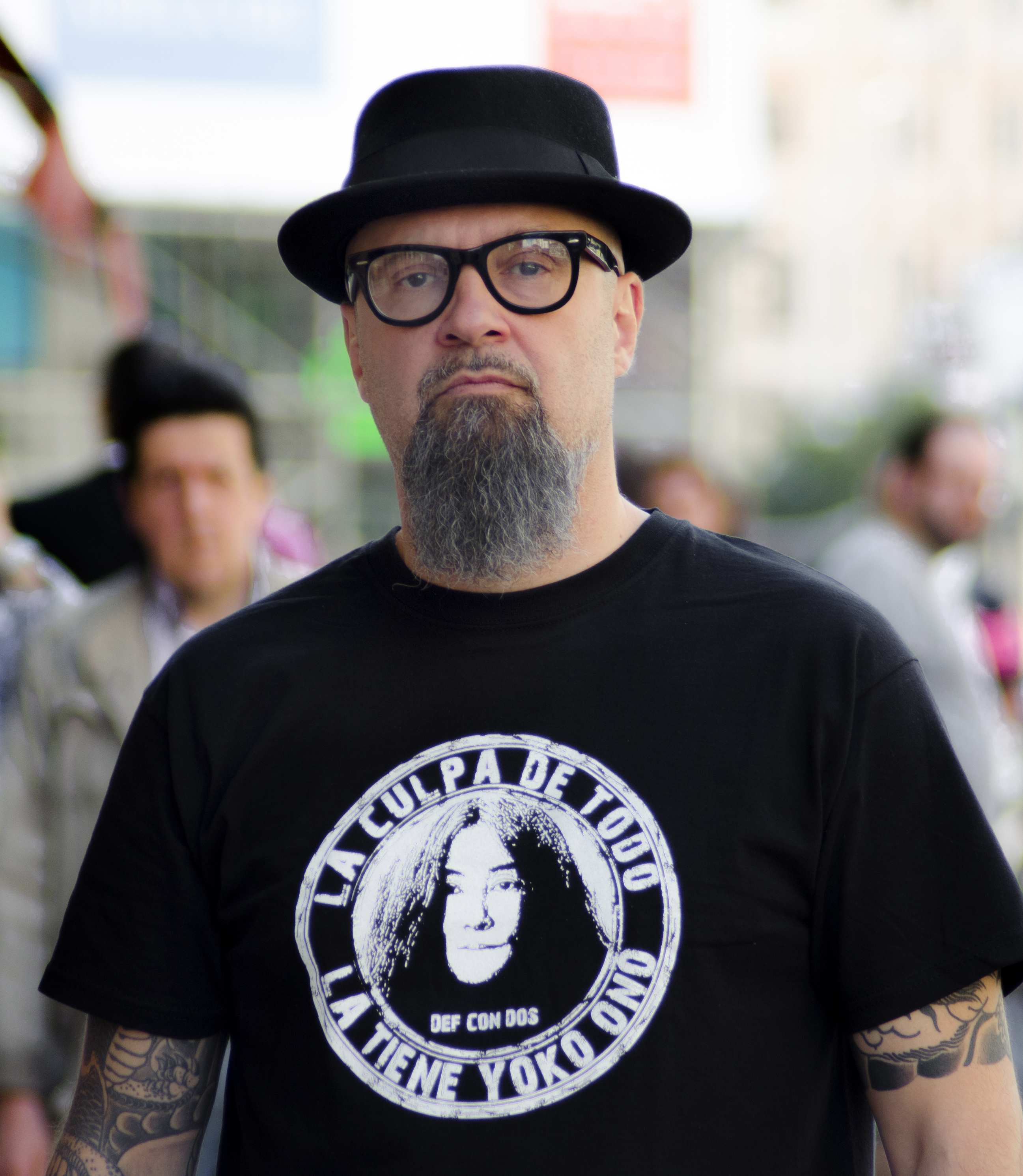 César Strawberry, líder de la banda de rap Def Con Dos